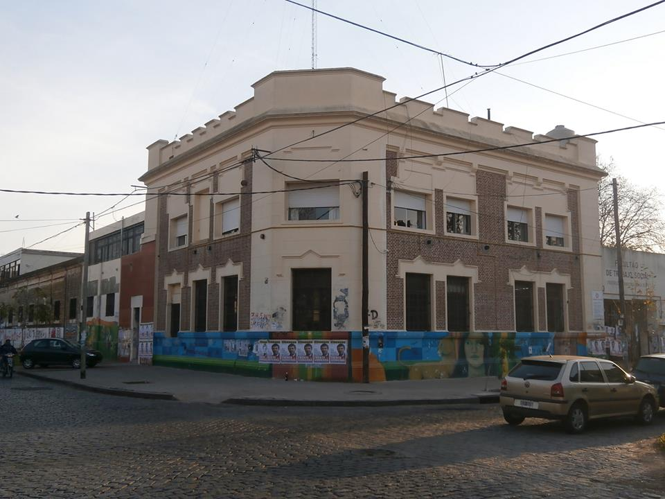 Facultad de Trabajo Social de la Universidad Nacional de La Plata, edificio en la esquina de las calles 9 y 63.